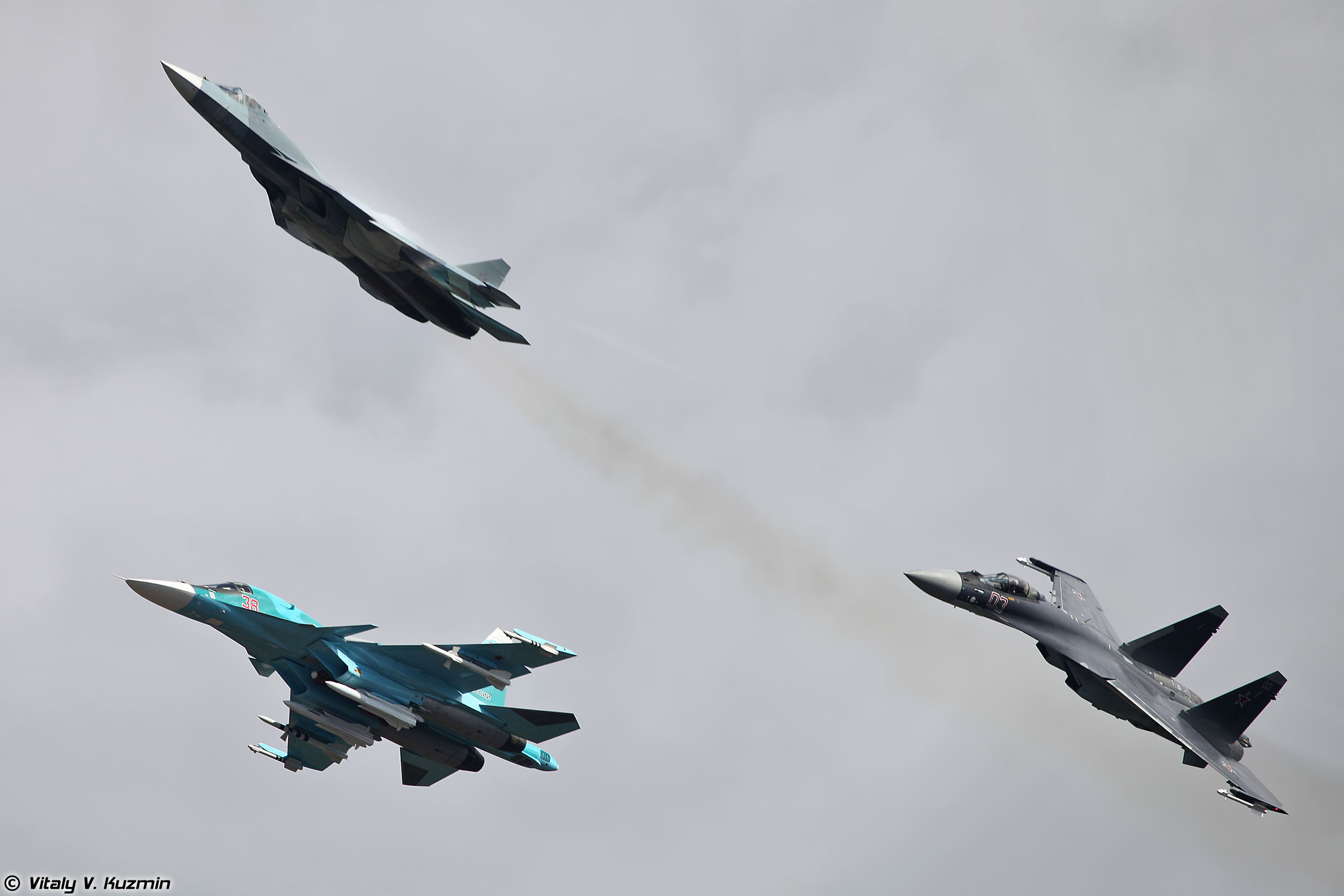 Роспуск Су-34, Т-50 и Су-35С (Su-34, T-50 and Su-35S)